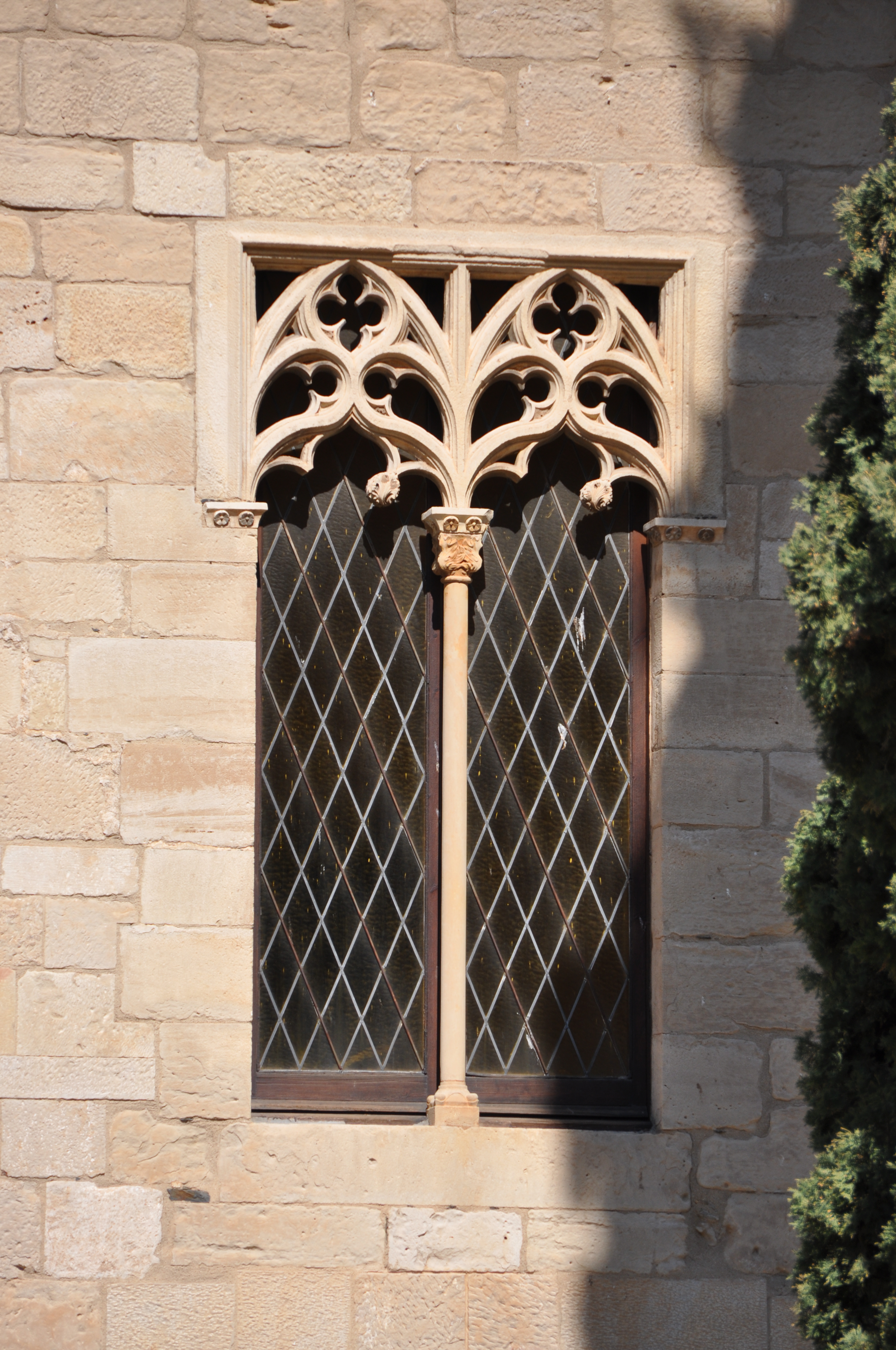 Poblet